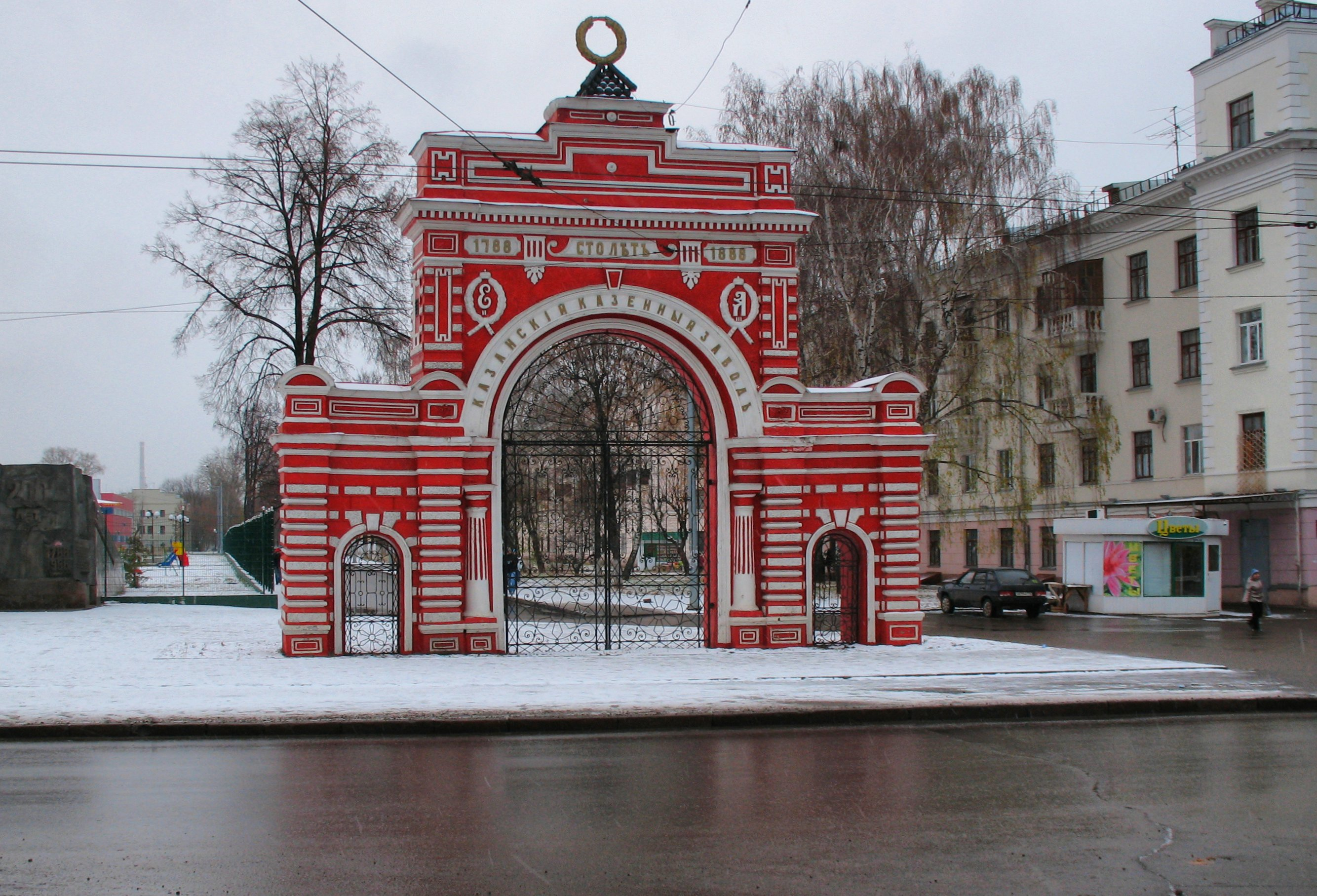 Красный ворота в Кировском районе Казани